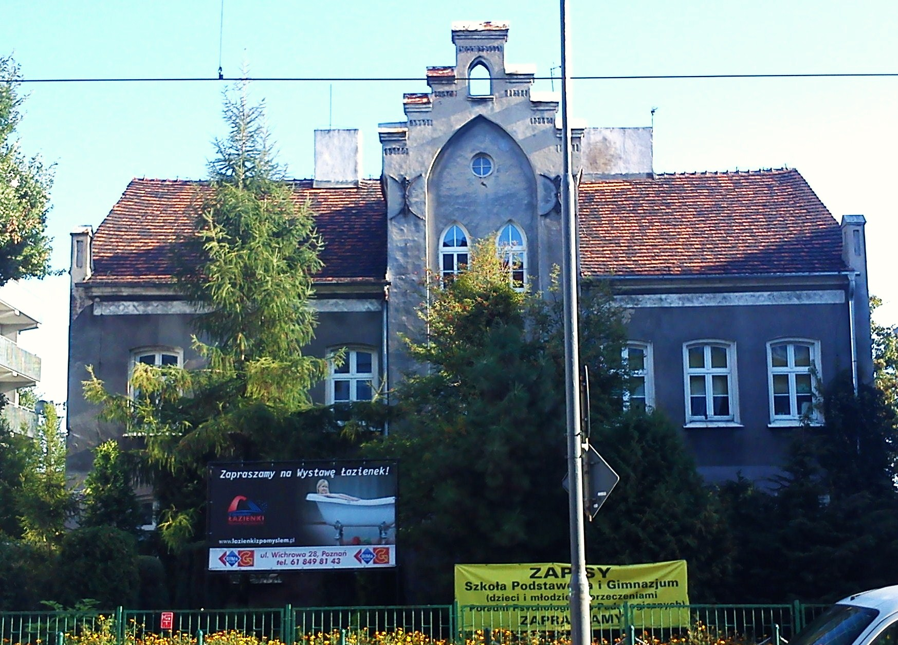 Poznań, szkoła - ul. Dąbrowskiego 73.